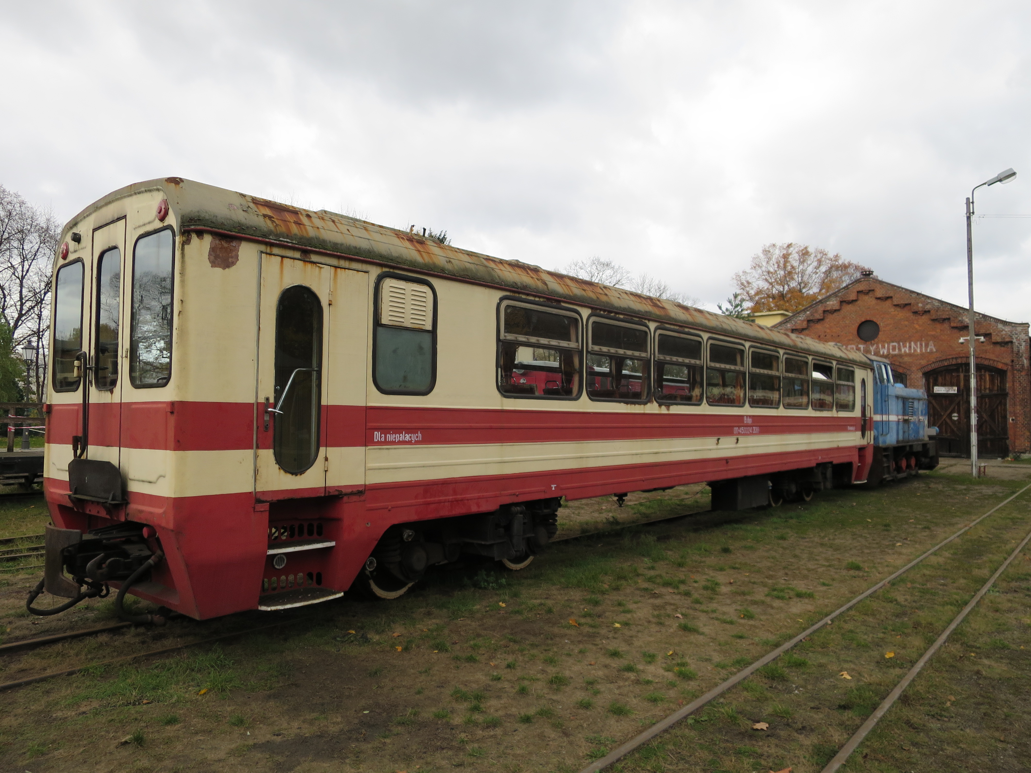 Wąskotorowy wagon pasażerski A20D-P na stacji kolejowej w Rudach. This photo was taken during Wikiexpedition 2016 set up by Wikimedia Polska Association.You can see all photographs in categories Wikiekspedycja Opolska 2016 (Polish part) and Mediagrant III:Wikiexpedice Slezsko (Czech part).